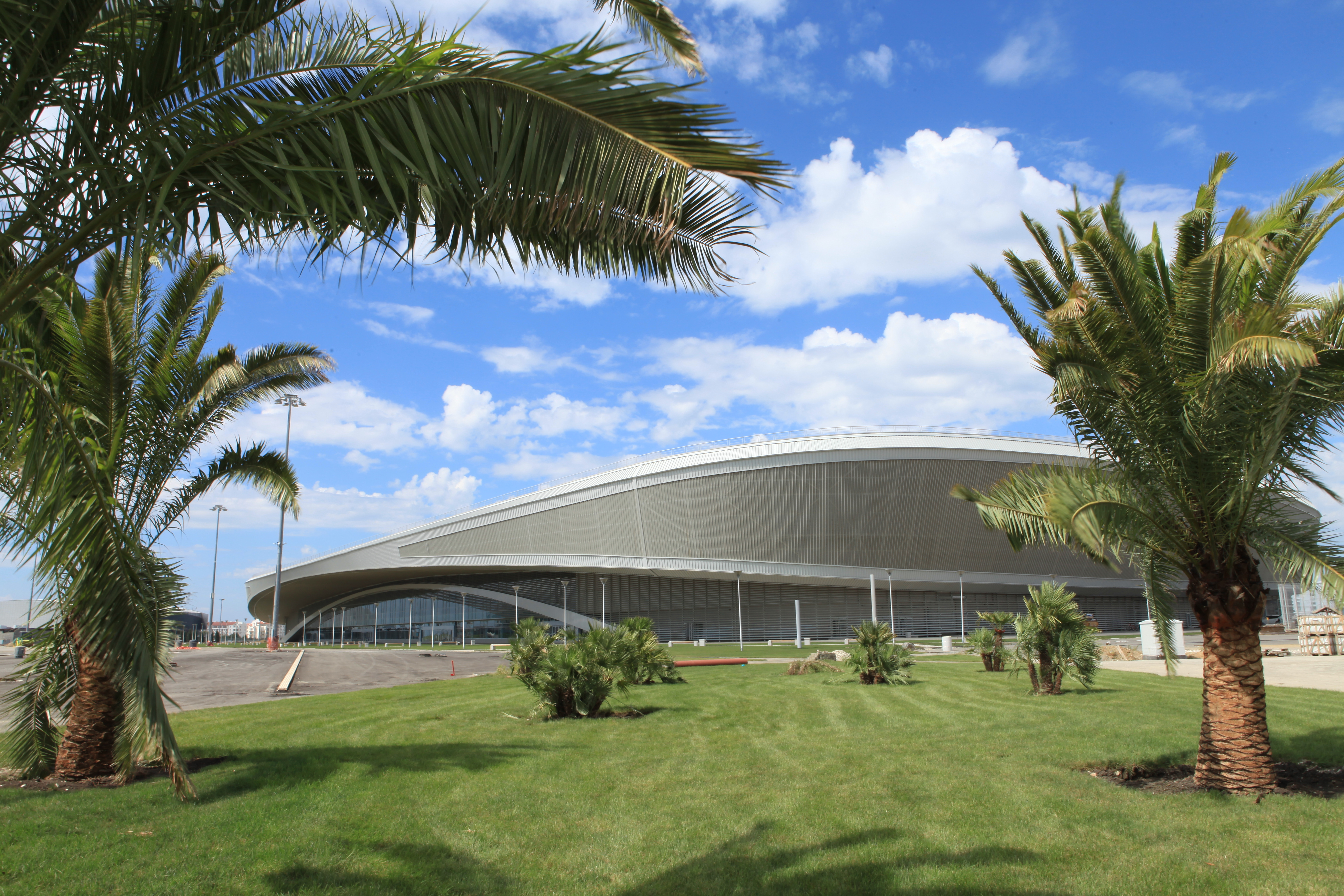 Собственник объекта ОАО "Центр "Омега"